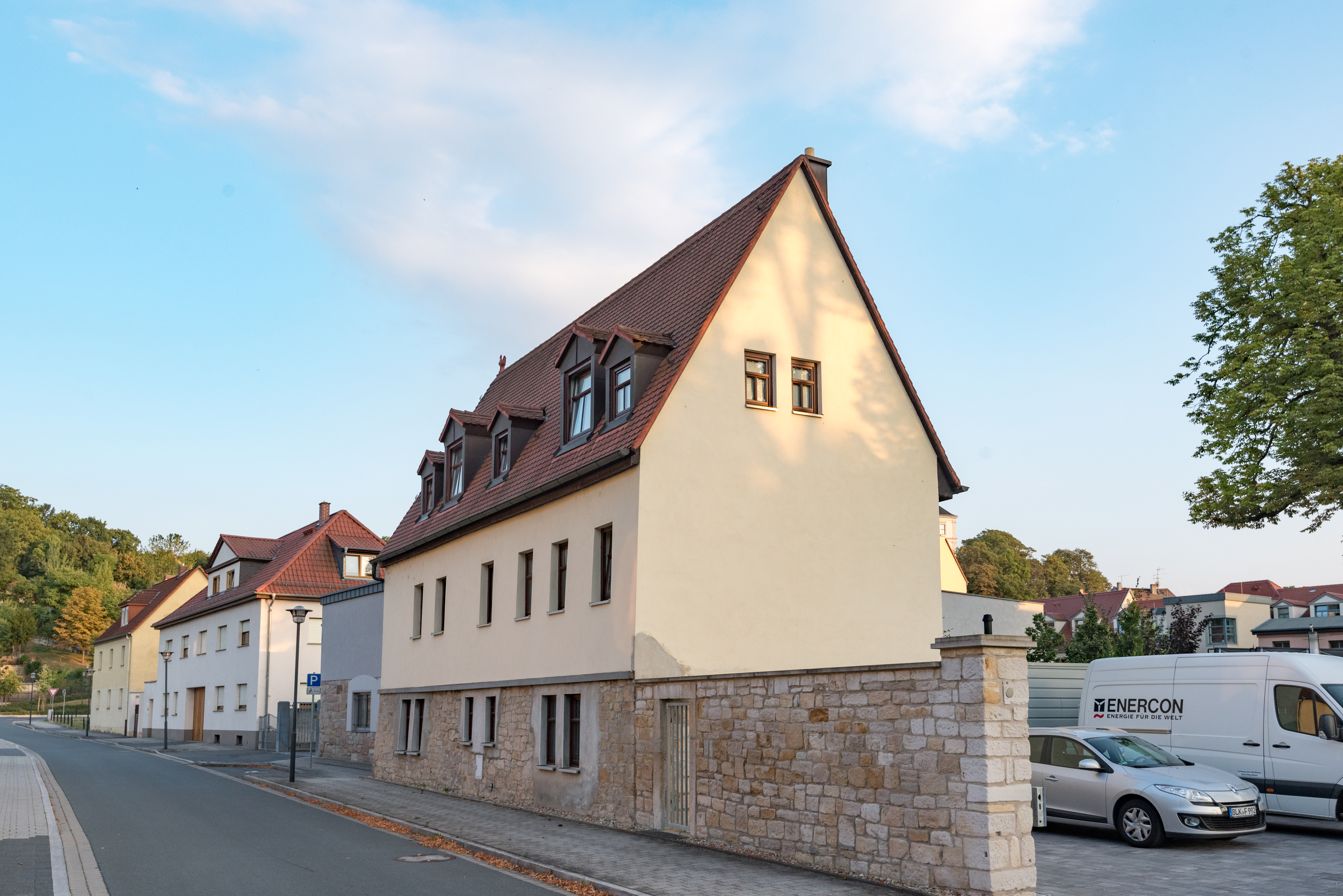 Weißenfels, Töpferdamm 12